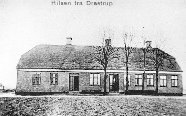 Drastrup Skole, Drastrup.